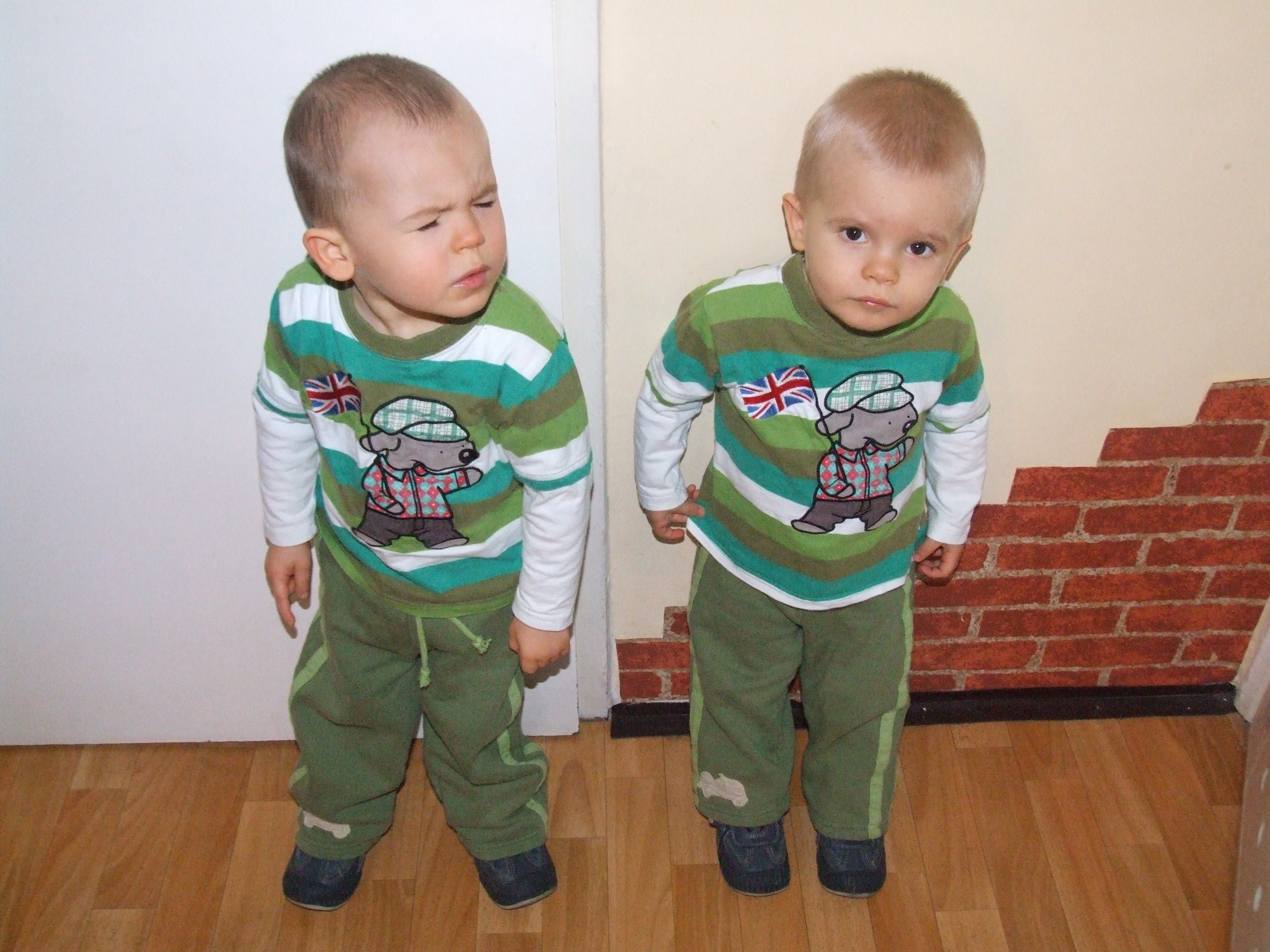 Szymon i Krystian